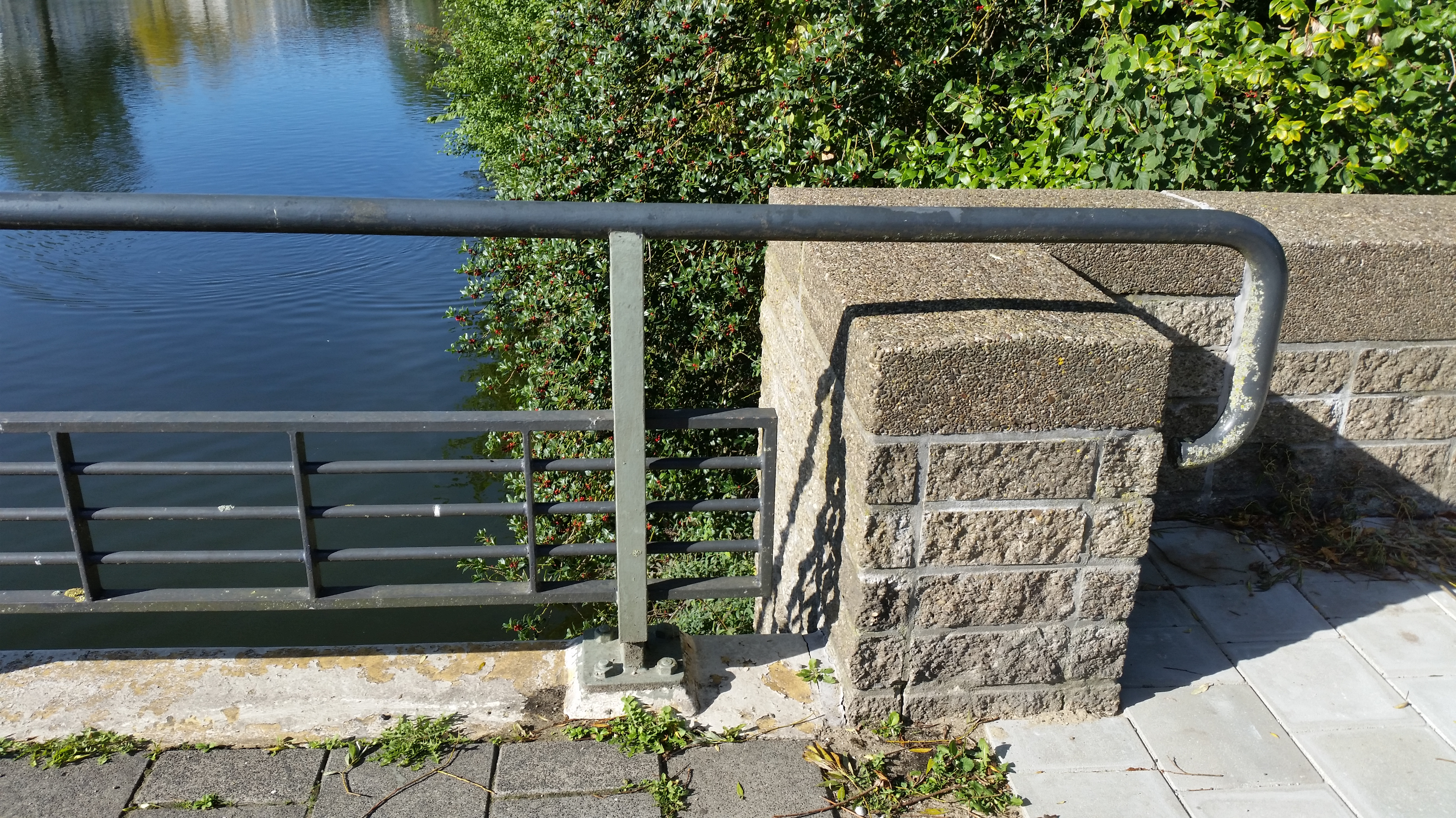 Van leuning naar balustrade van Brug 755 (in Amsterdam)